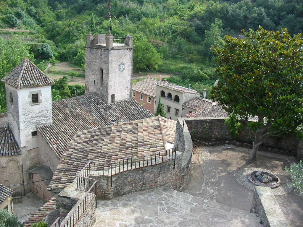 Vista interior del pueblo. Objeto de la foto: la iglésia.